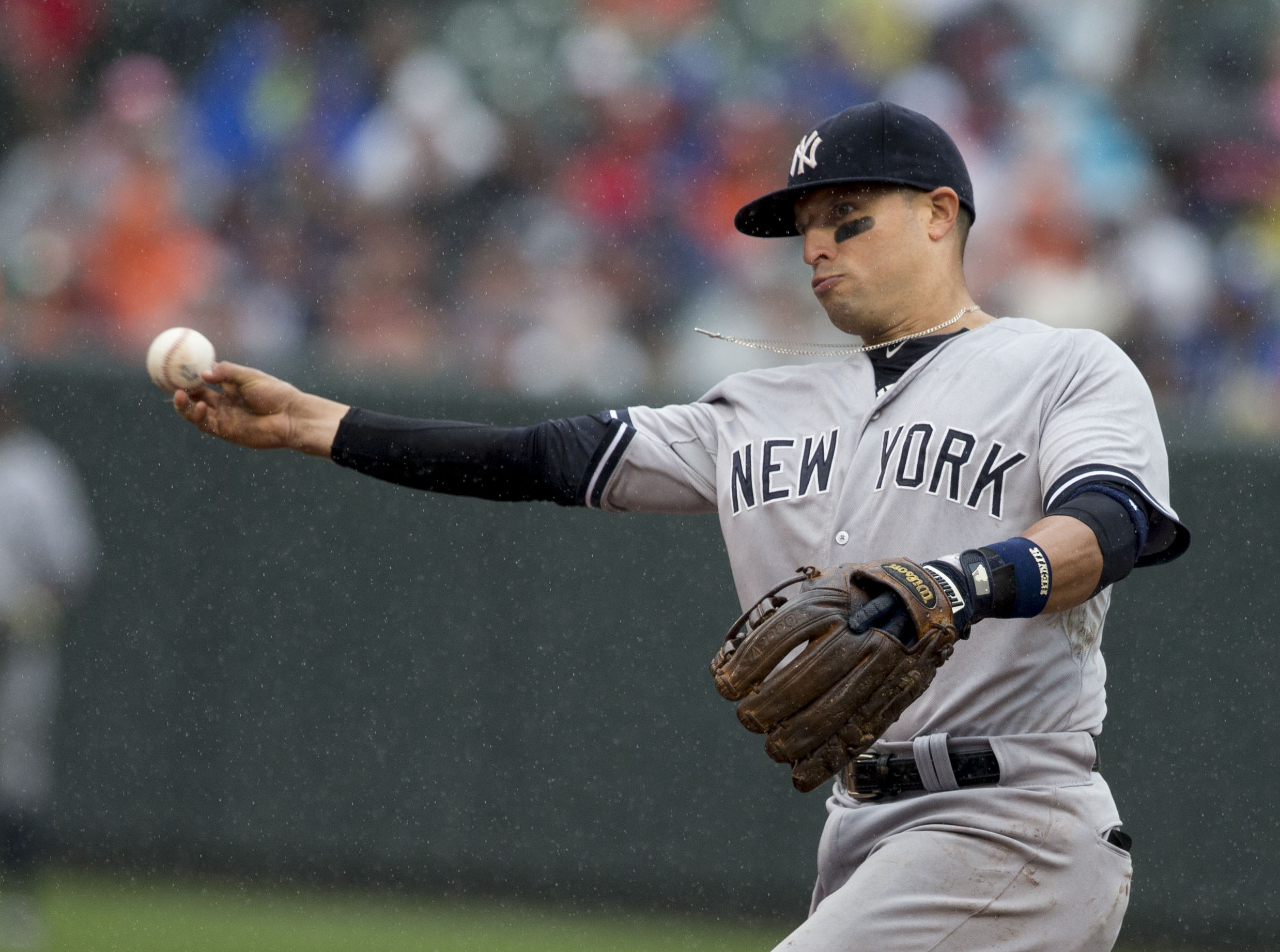 Martín Prado